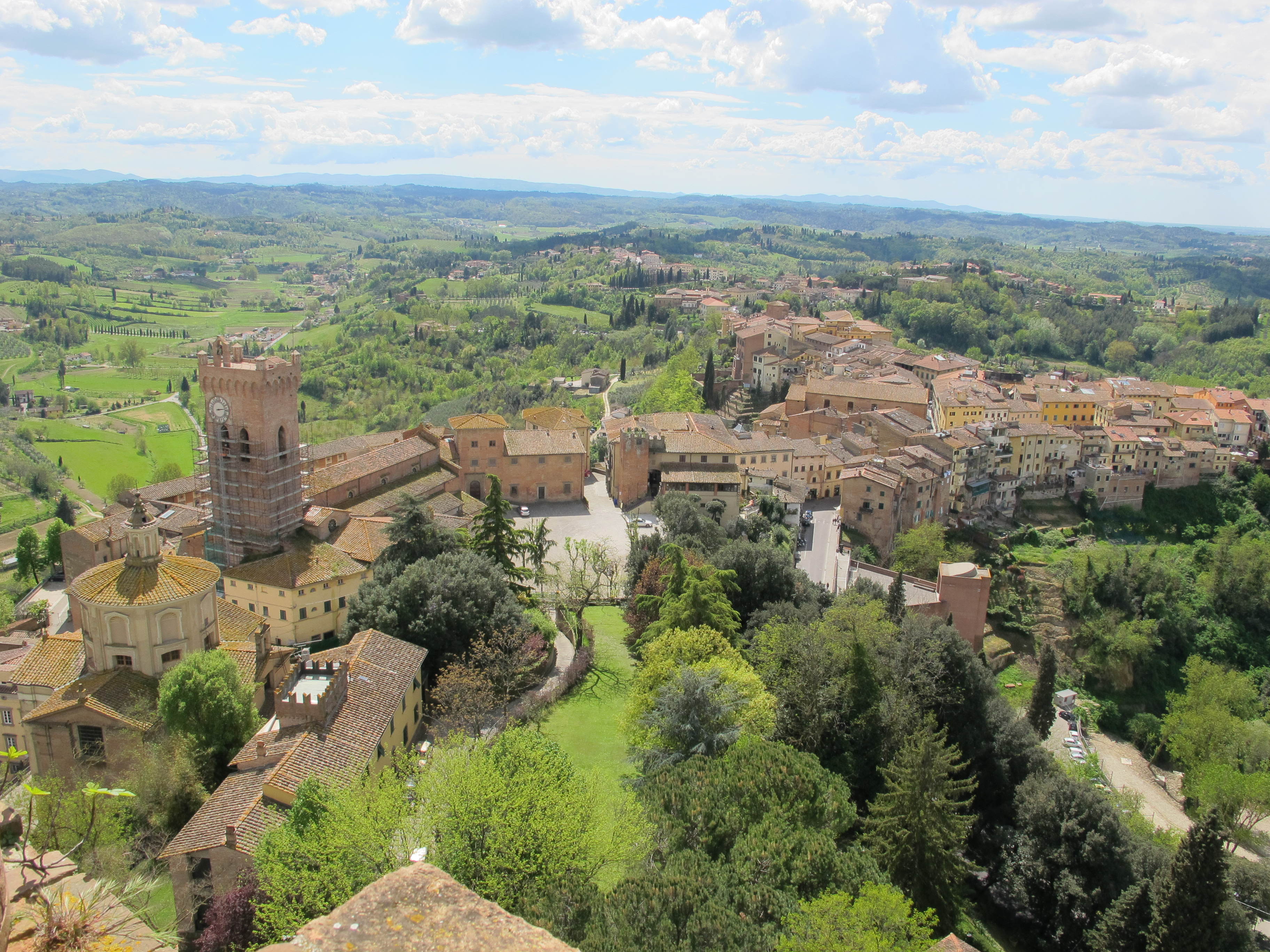 San miniato, veduta